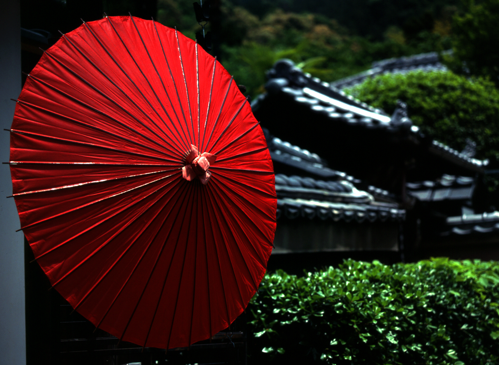 Zelfgemaakte media (gecande 4,5x6 dia)